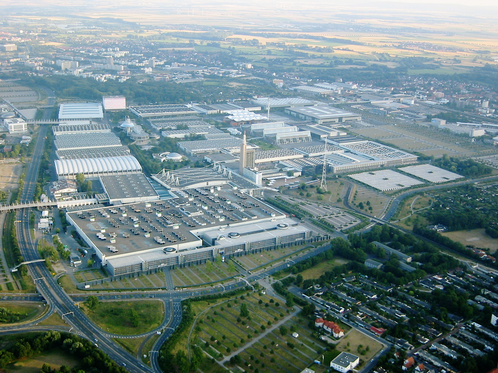 Messegelände Hannover, von der nordöstlichen Ecke aus gesehen. Blick auf Messehalle 1, Halle 3 mittig darüber, rechts darüber befindet sich Halle 2.